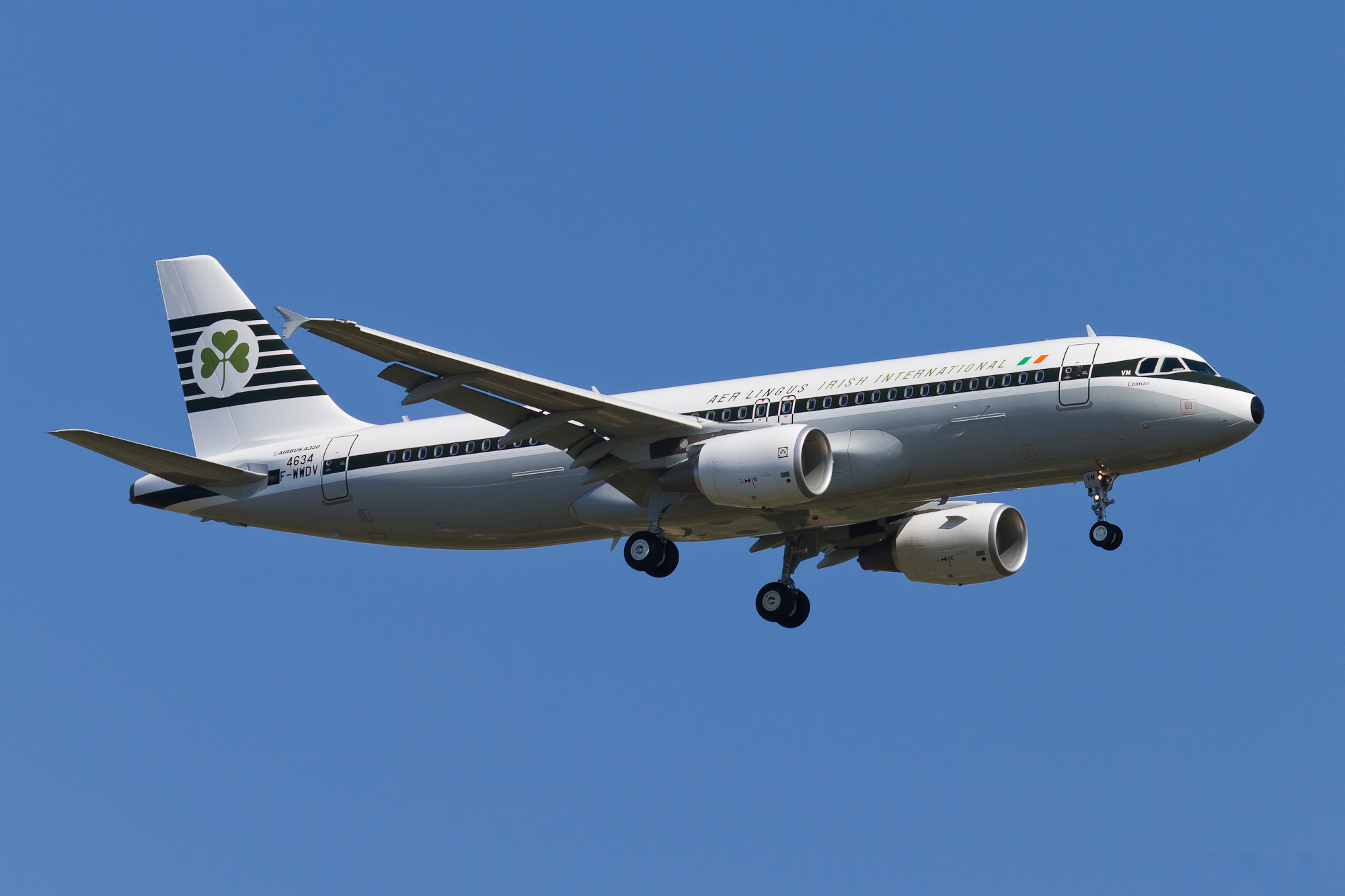 Airbus A320 Aer Lingus "Retrojet" F-WWDV EI-DVM, MSN 4634